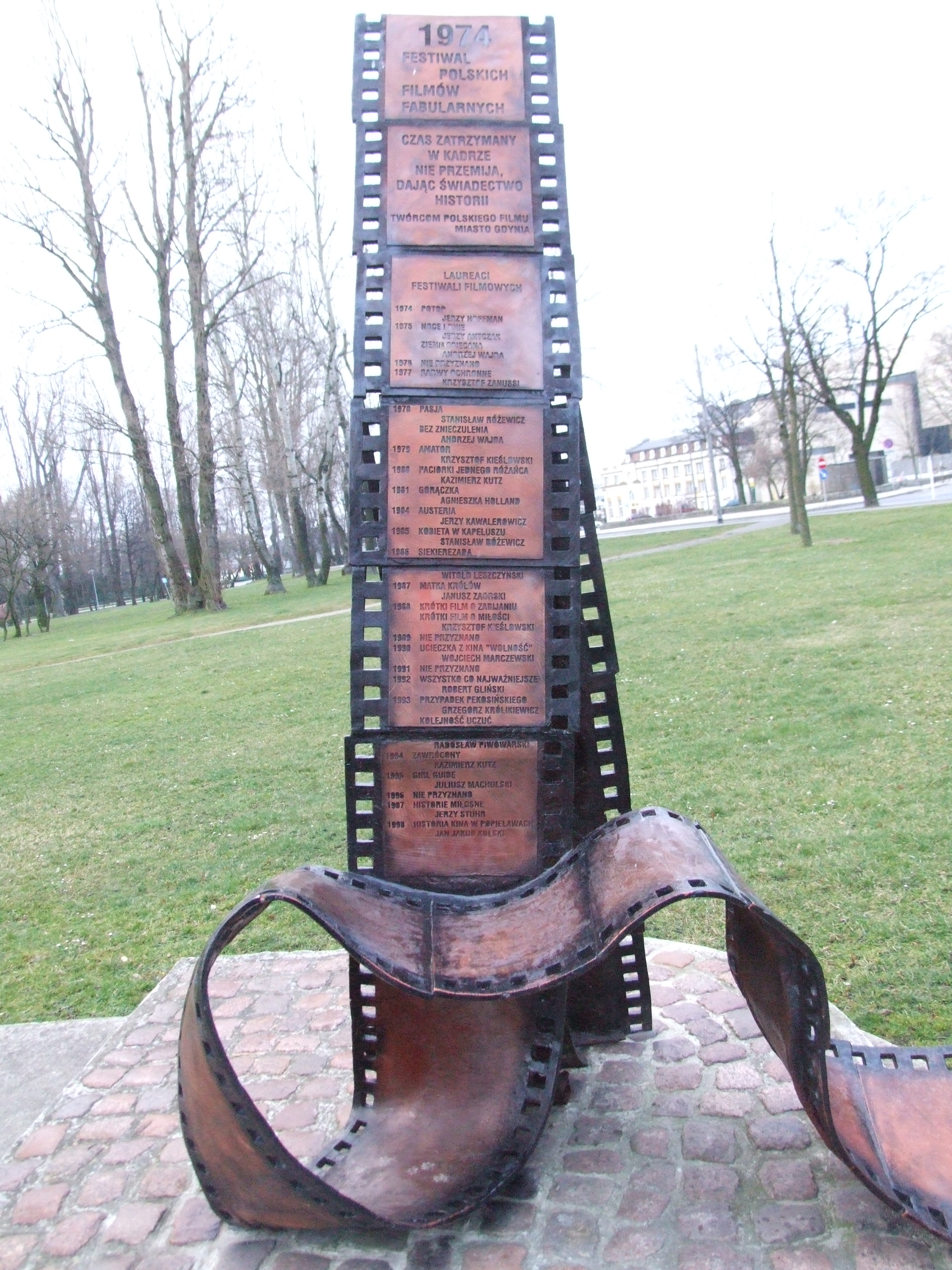 Pomnik Festiwalu Polskich Filmów Fabularnych - Gdynia